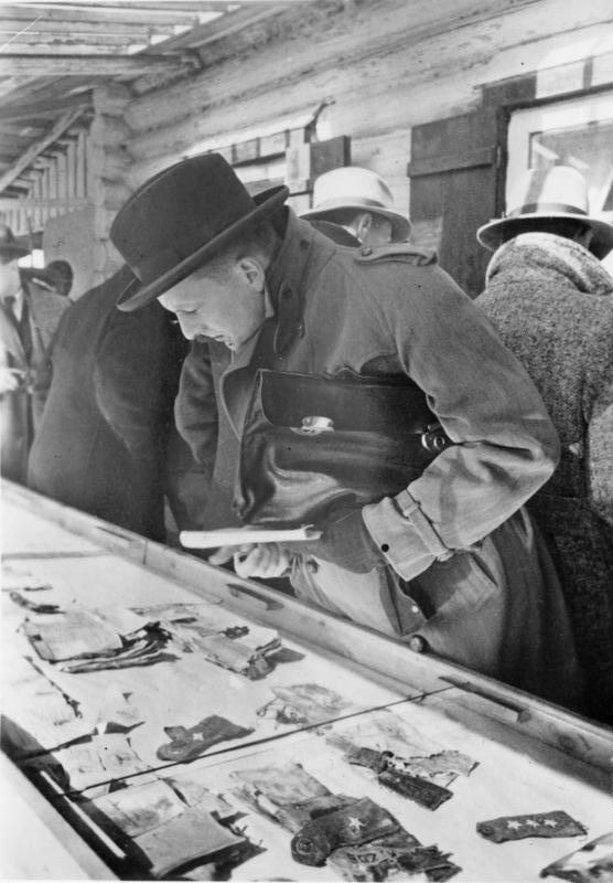 This description has been identified as biased or incorrect: Propaganda and lies.Zentralbild II. Weltkrieg 1939 - 45 Im April 1943 starten die deutschen Faschisten die antisowjetische Propaganda über den Massenmord im Katyner Wald, 15 klm nw. von Smolensk, wo sie Massengräber mit ca. 11 000 ermordeten kriegsgefangenen Polen als Greueltaten der Sowjets erklärten. ( Die Außerordentliche Staatliche Kommission unter Leitung des Akademikers Burdenko stellte in ihrem Untersuchungsbericht vom 24.01.1944 fest, dass die Ermordungen nicht wie die Faschisten behauptet hatten, im Frühjahr 1940 sondern erst im Herbst 1941, also von den Faschisten selbst, stattgefunden haben.) U. B. z: die von den Faschisten eingeladenen Vertreter der Auslandspresse besichtigen die Funde, die die Schuld der Sowjets an den Greueln beweisen sollen. April 1943. 1942 - 43